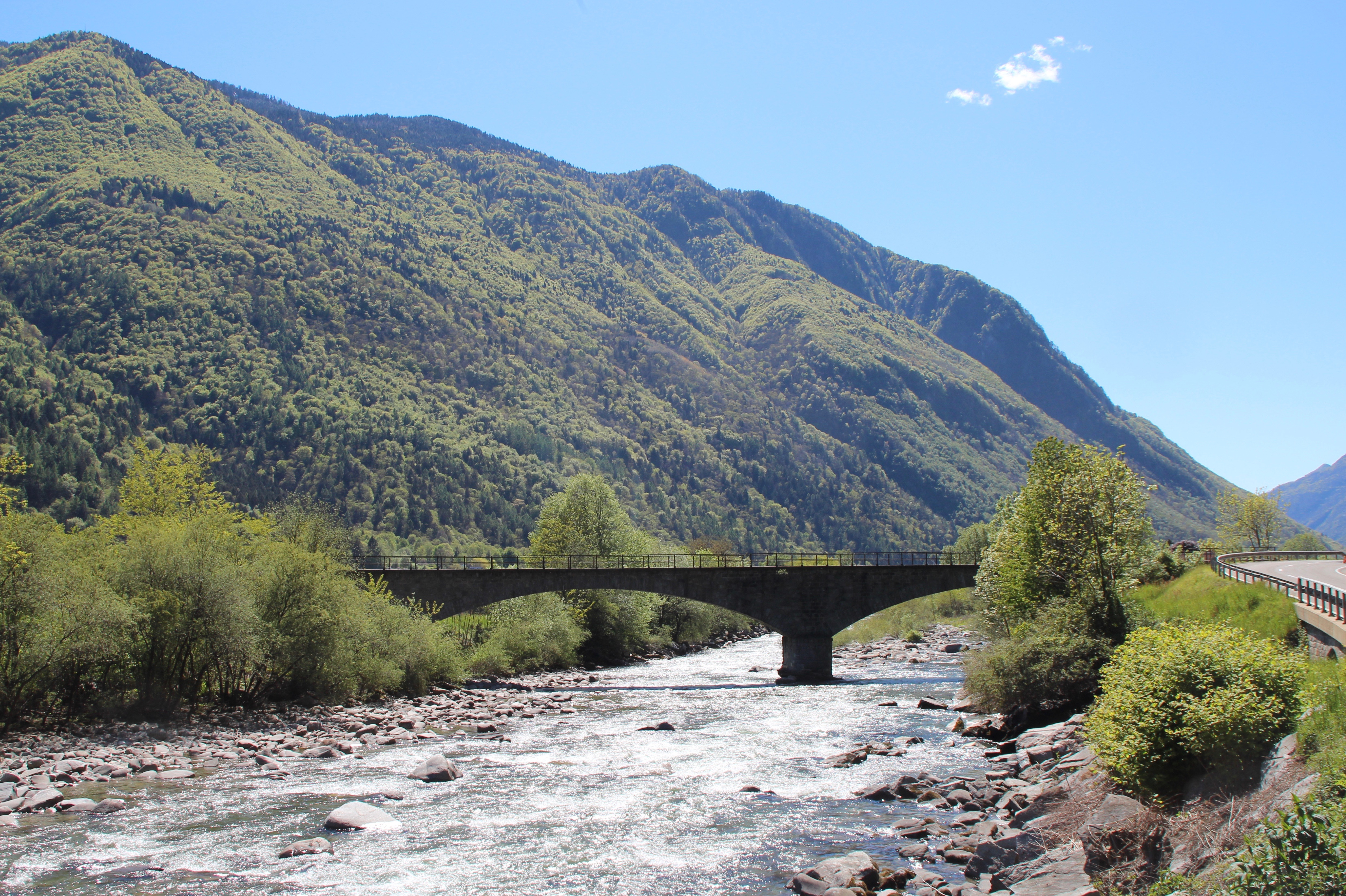 Moësa unterhalb Roveredo